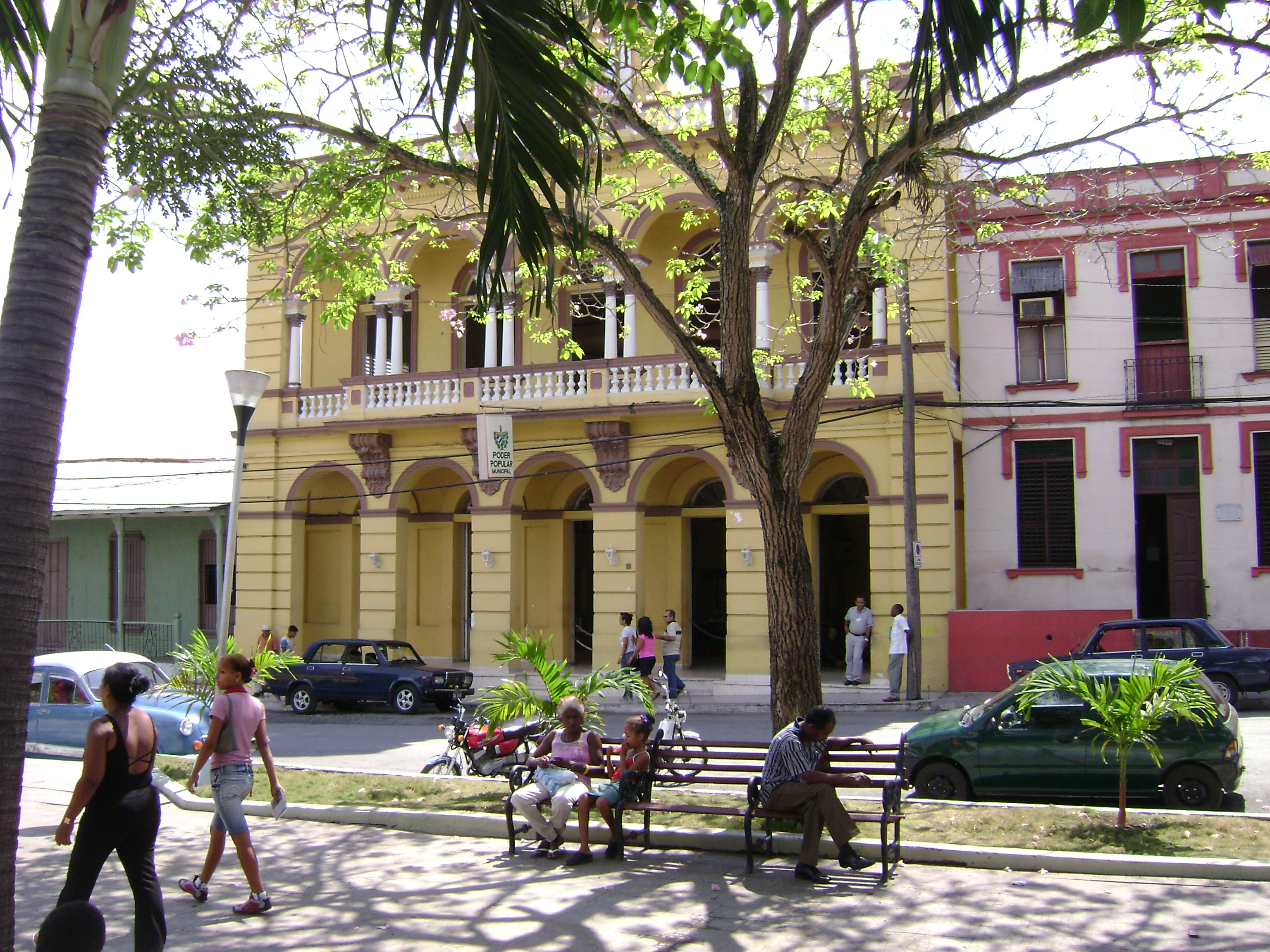 Gobierno municipal en Palma Soriano.